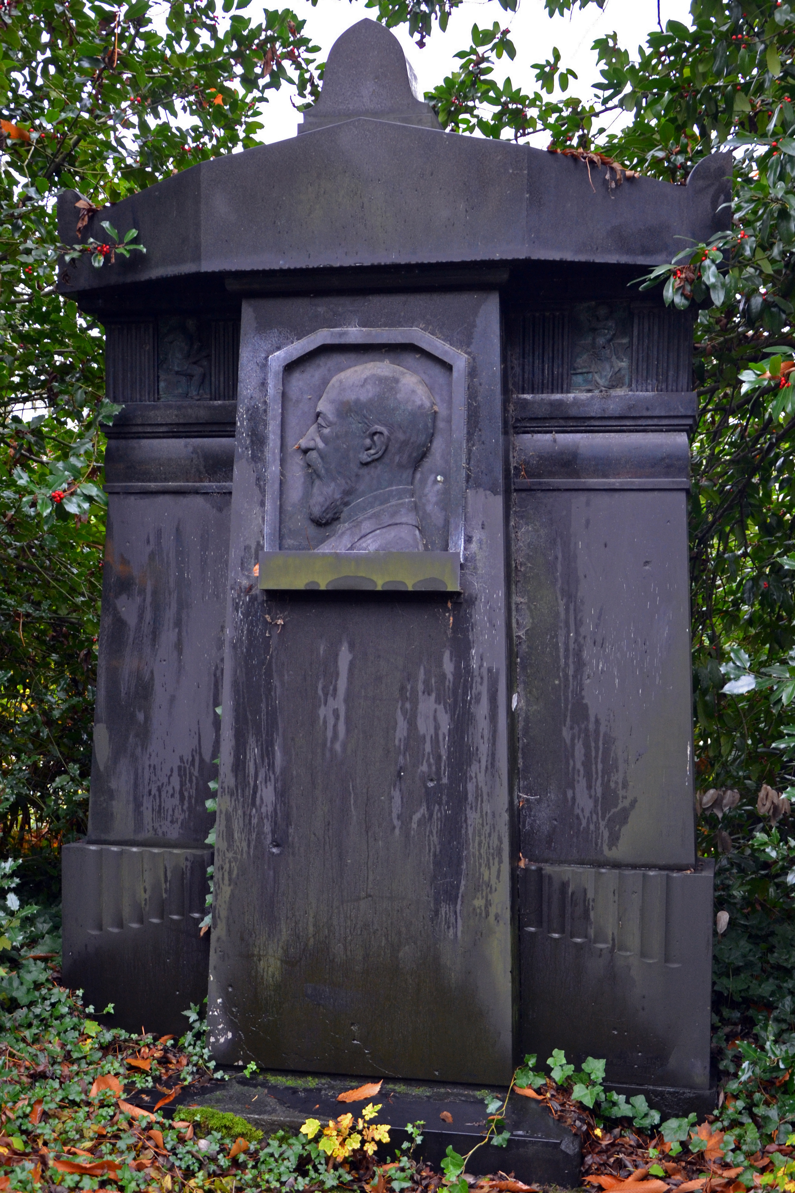 Ostfriedhof Essen: Grabmal des Maschinenbau-Ingenieurs und Mitglieds des Krupp-Direktoriums Otto Budde; geb. 15. Juni 1848 in Bensberg; gest. 14. Dezember 1909 in Essen